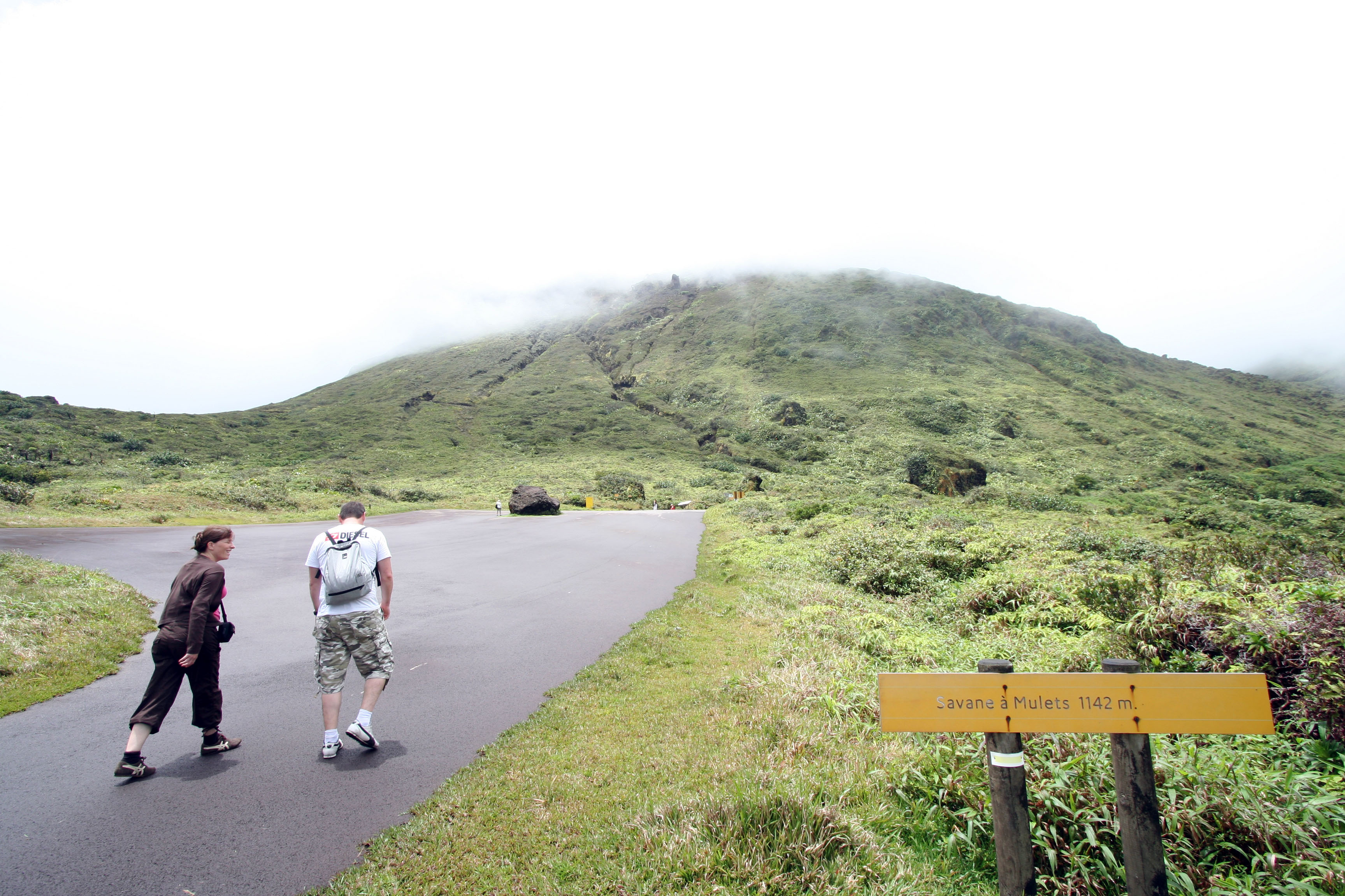 Soufrière, Guadeloupe - Savane à mulets - 1142 mètres.